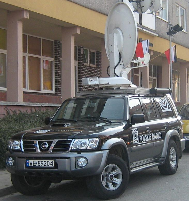 Satelitarny wóz Polskiego Radia w Kamieniu Pomorskim - Nissan Patrol Y61.